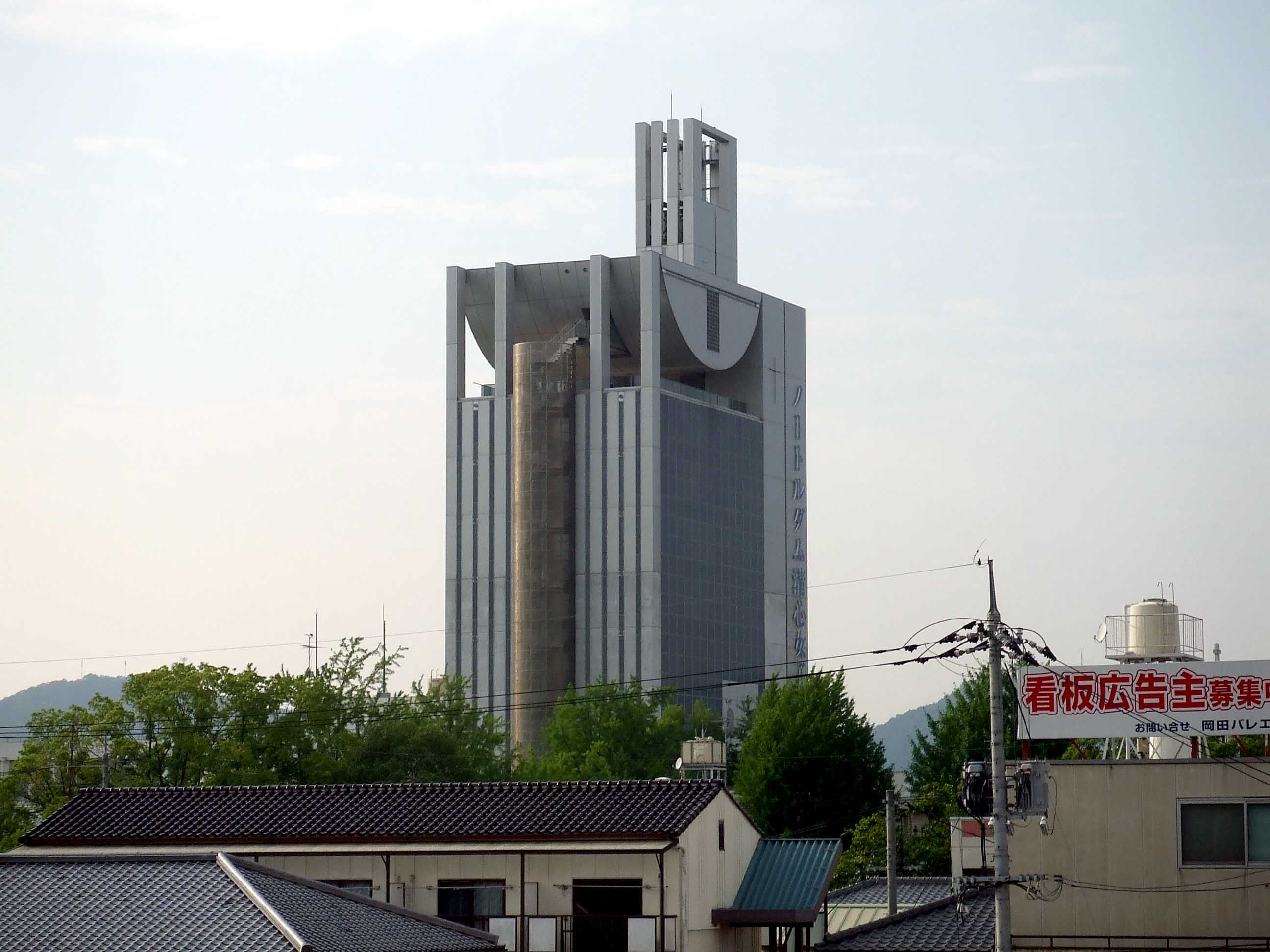 ノートルダム清心女子大学。岡山県岡山市北区伊福町。2008年7月11日、投稿者本人が撮影。